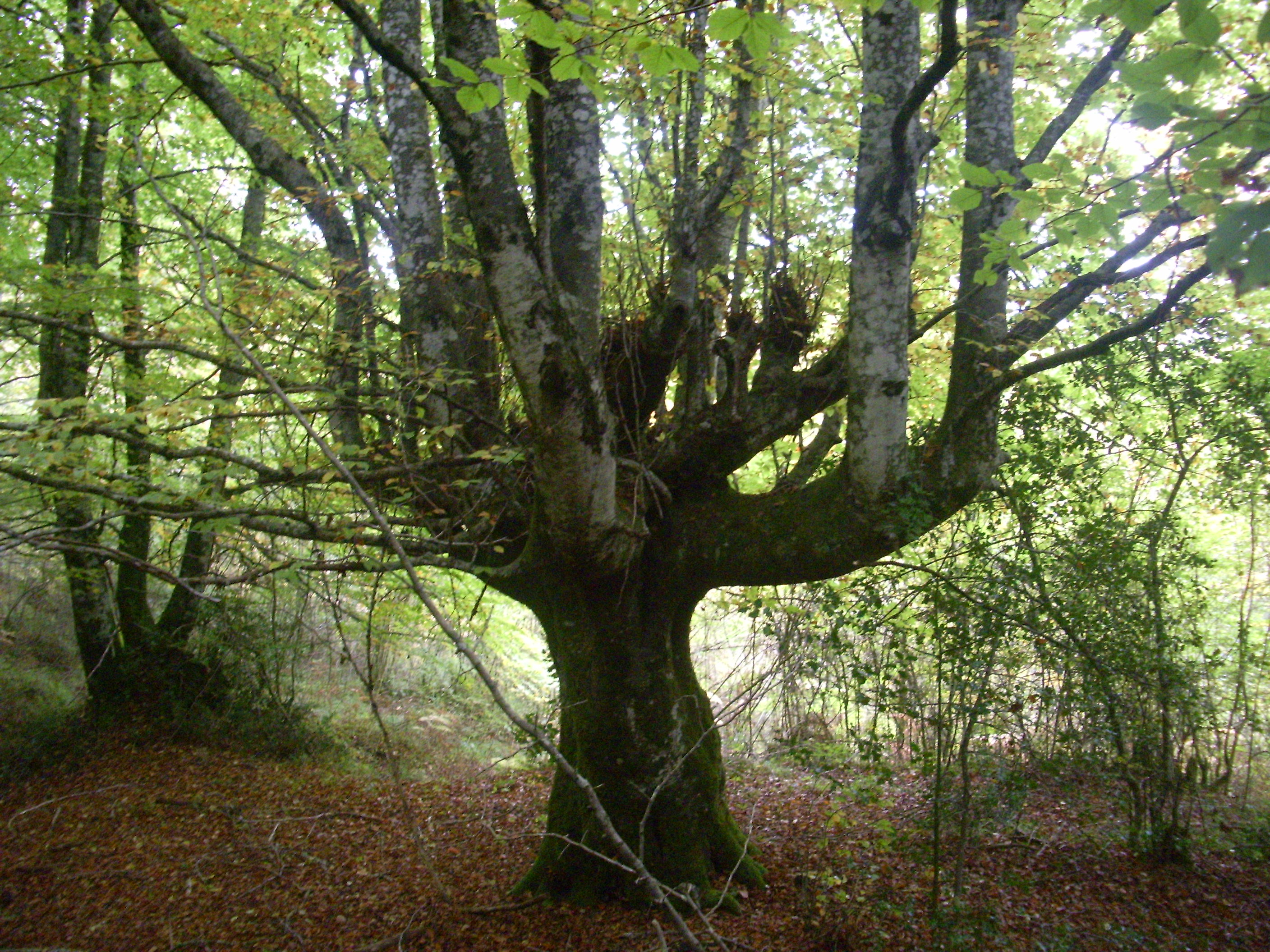 Trasmocho Haya